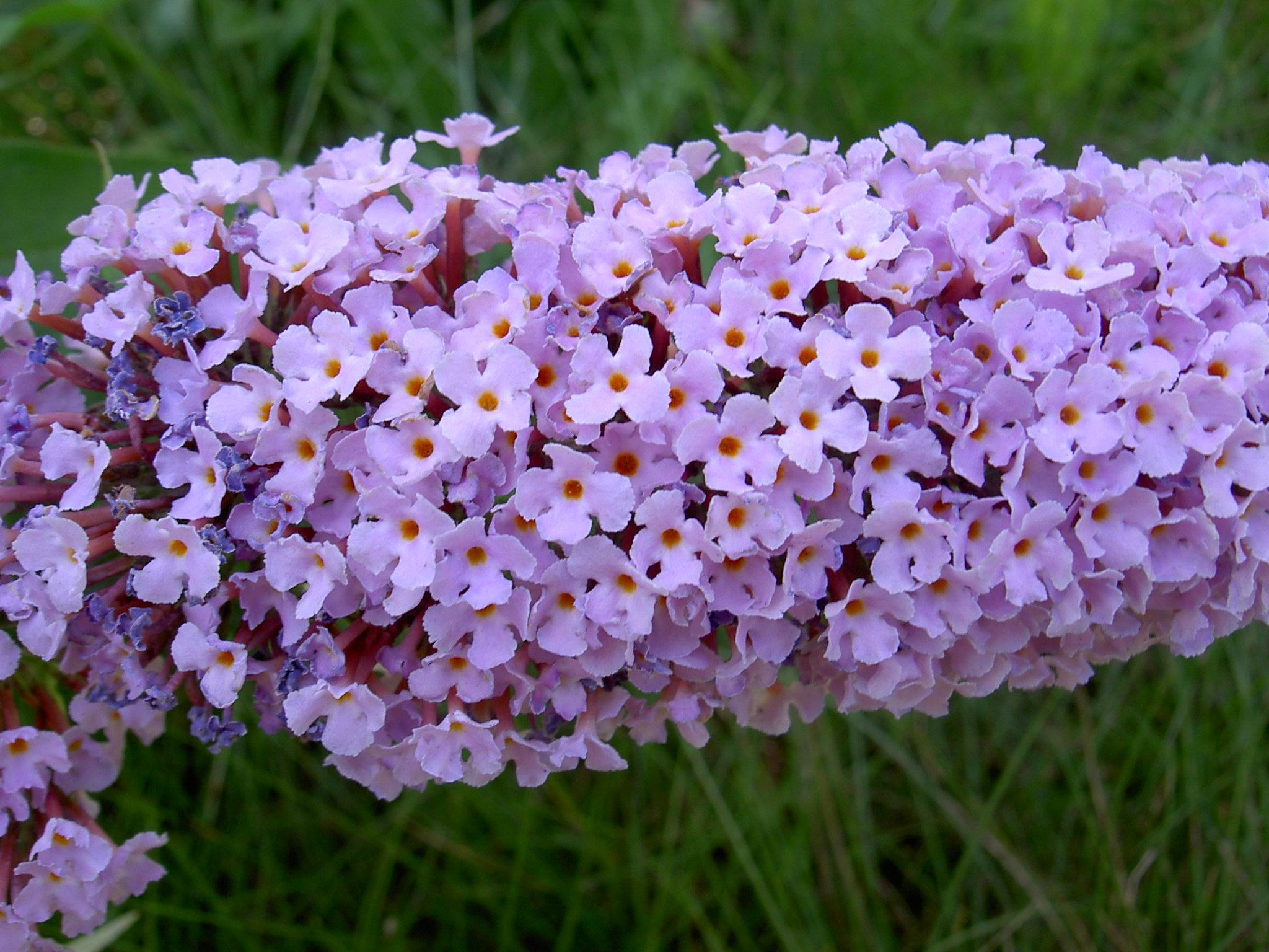 Buddleja davidii, de. Schmetterlingsstrauch, Blütenrispe